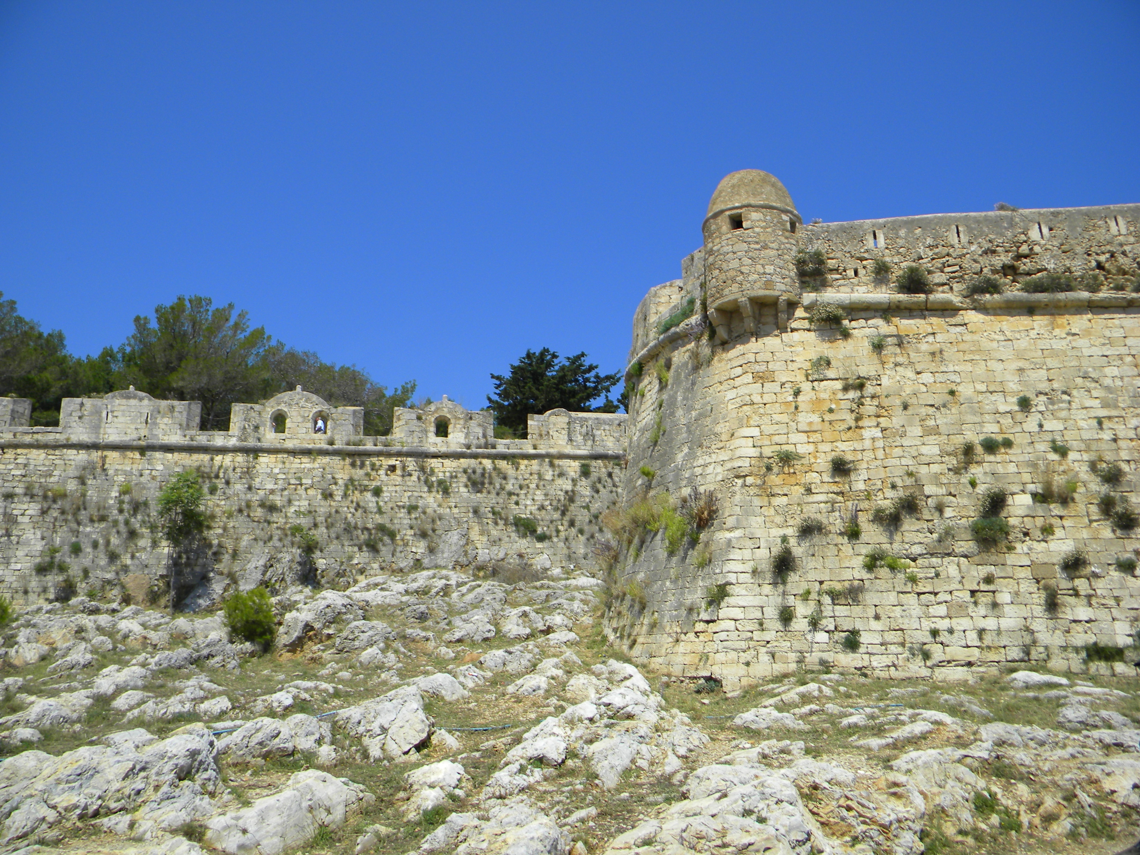 Венецианская крепость в городе Ретимнон